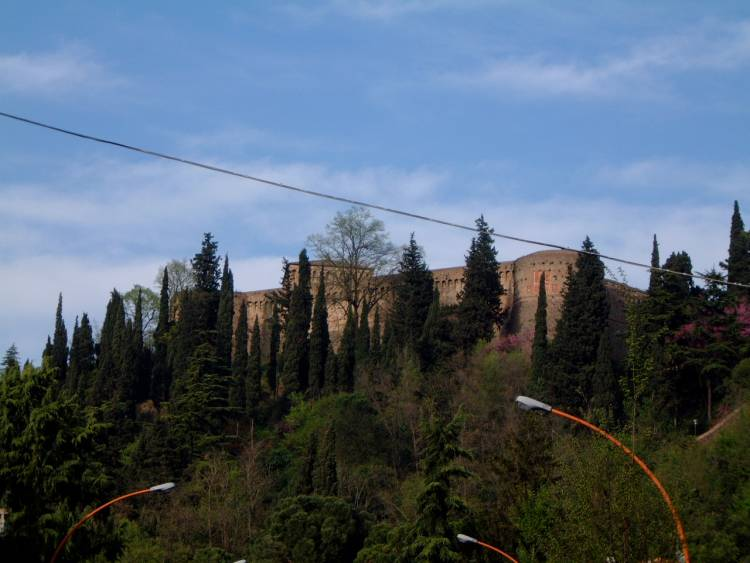 Je suis l'auteur de cette photo prise à Cesena en avril 2007